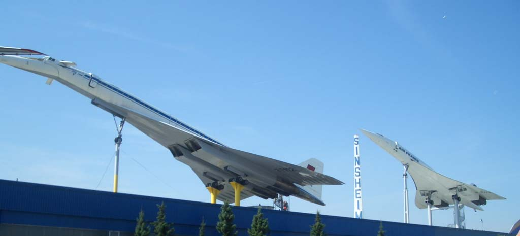 Concorde und Tupolev Tu-144 am Museum Sinsheim (links TU-144, rechts Concorde) selbst fotografiert!